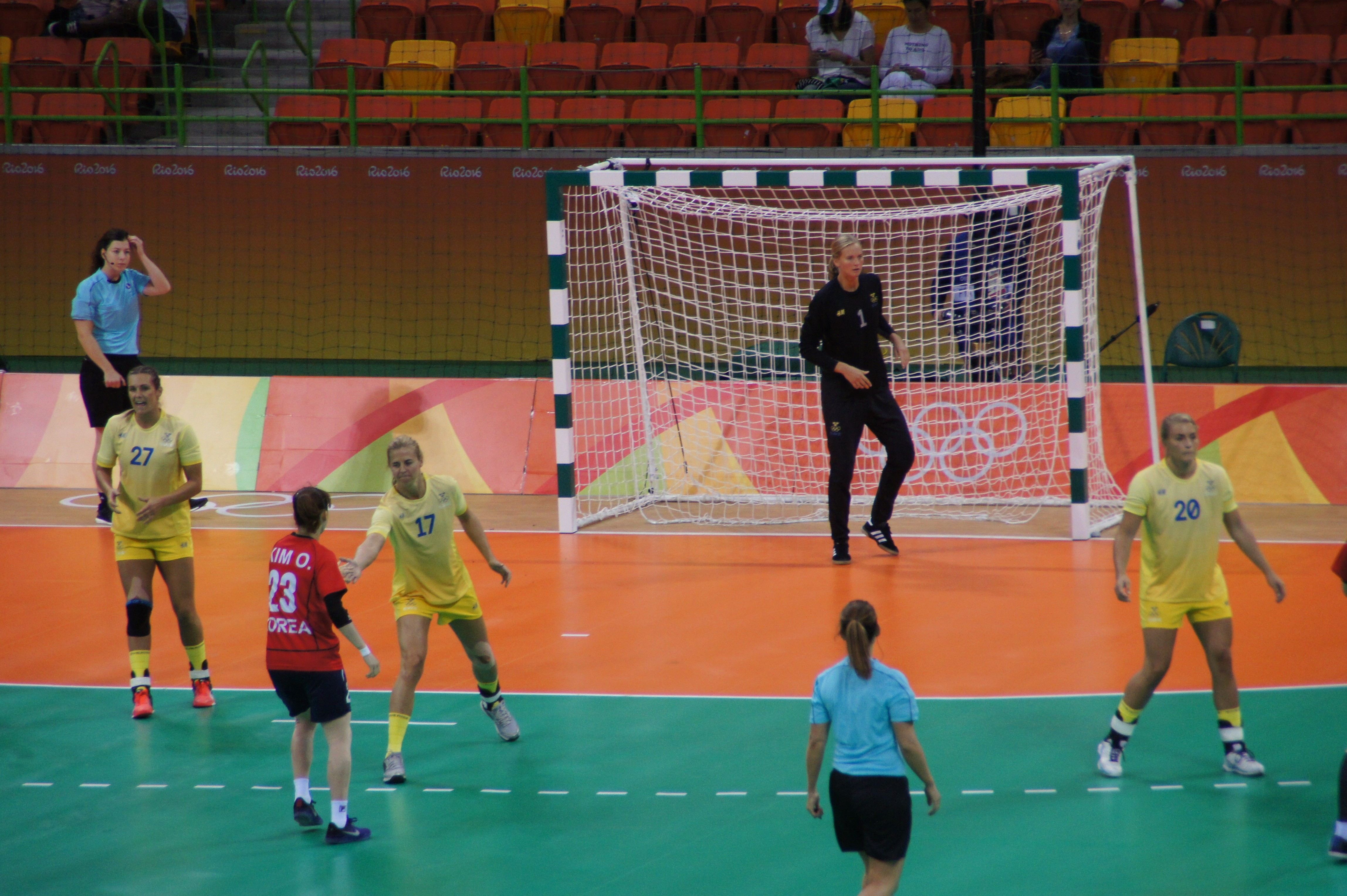 Rio 2016. a33 48